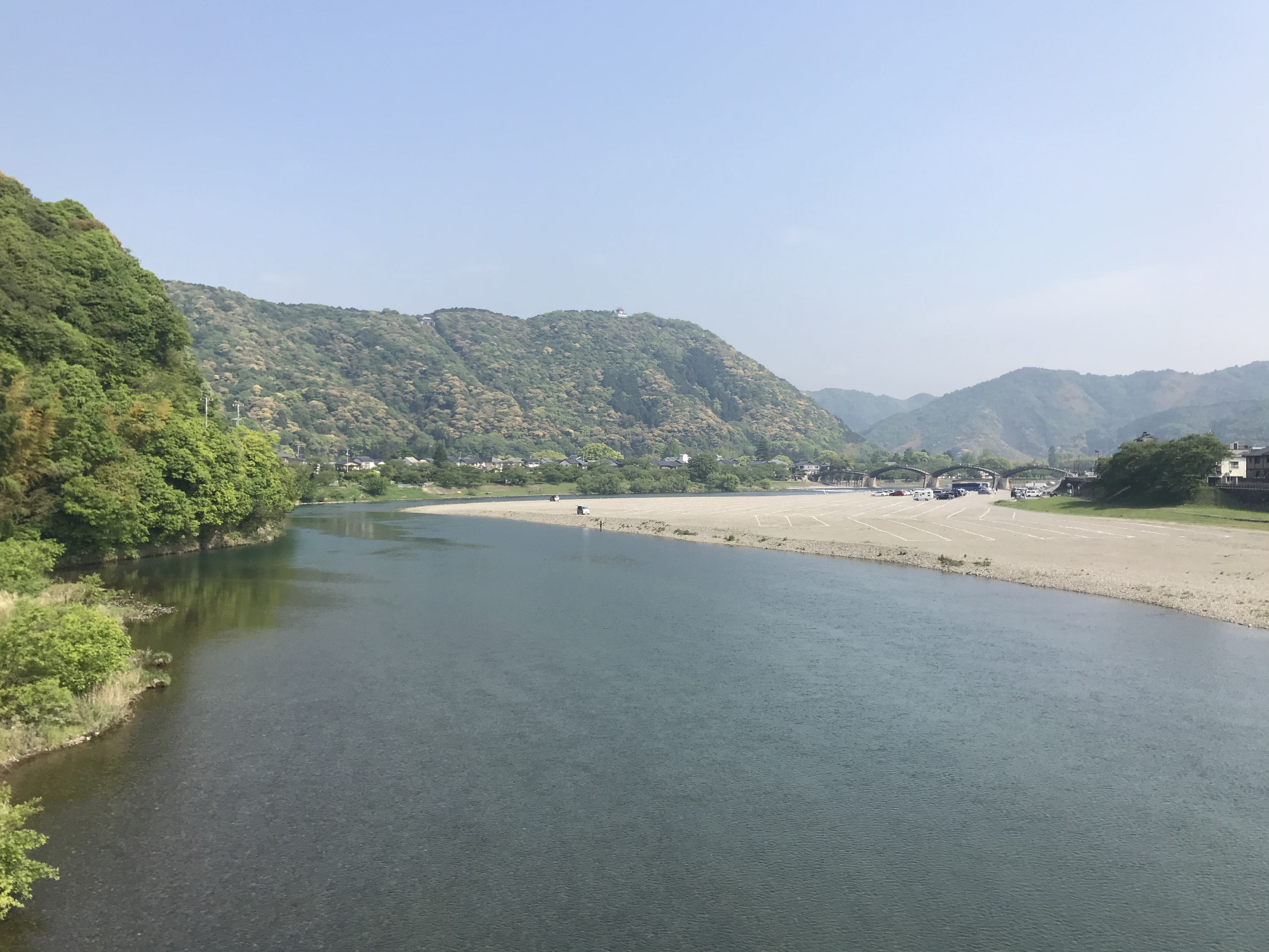 臥竜橋より望む岩国城、錦帯橋と錦川